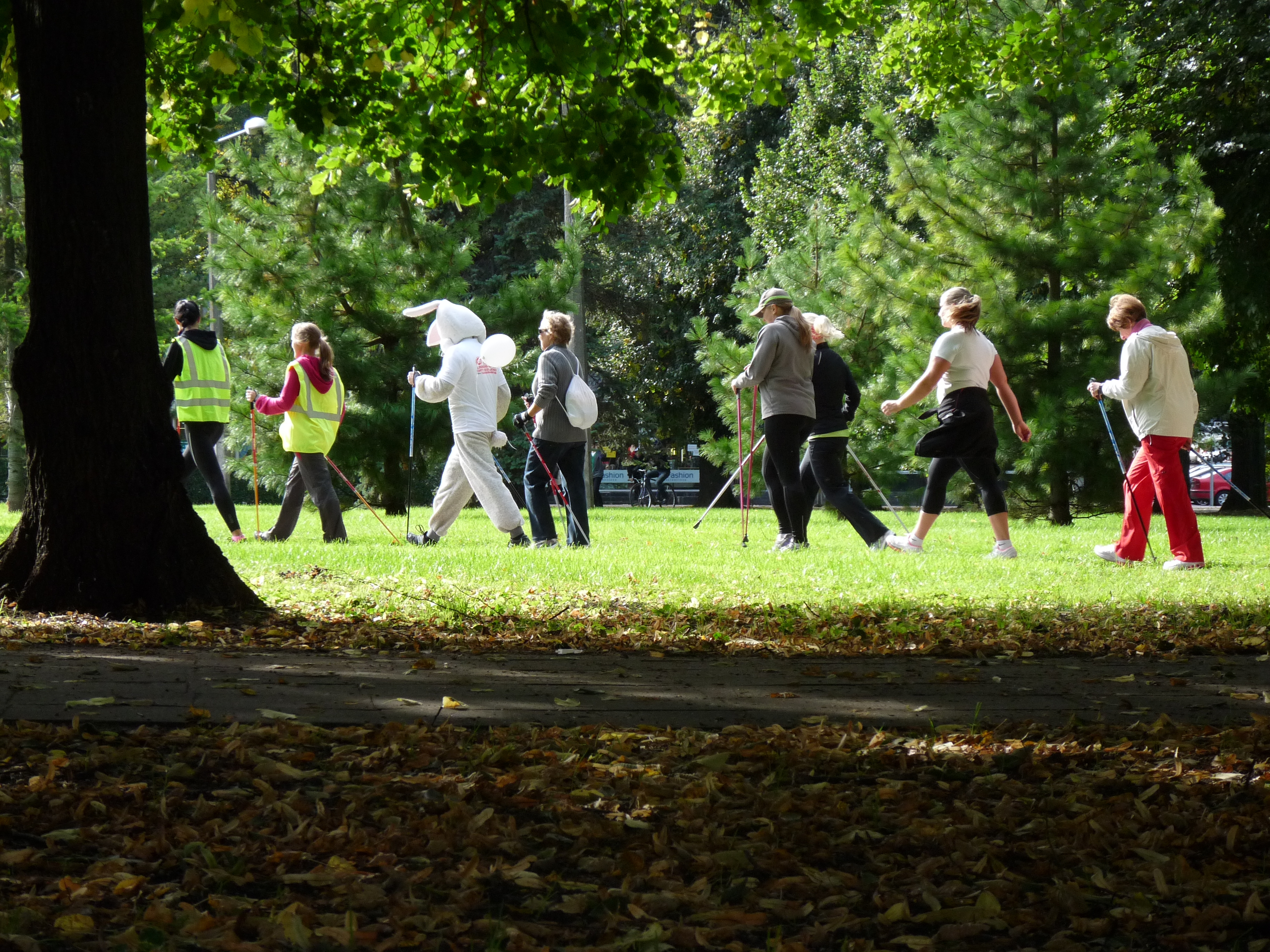 Kepikõndijad Tartu linna tervisepäeval maskoti juhtimisel Keskpargis, 22. september 2012